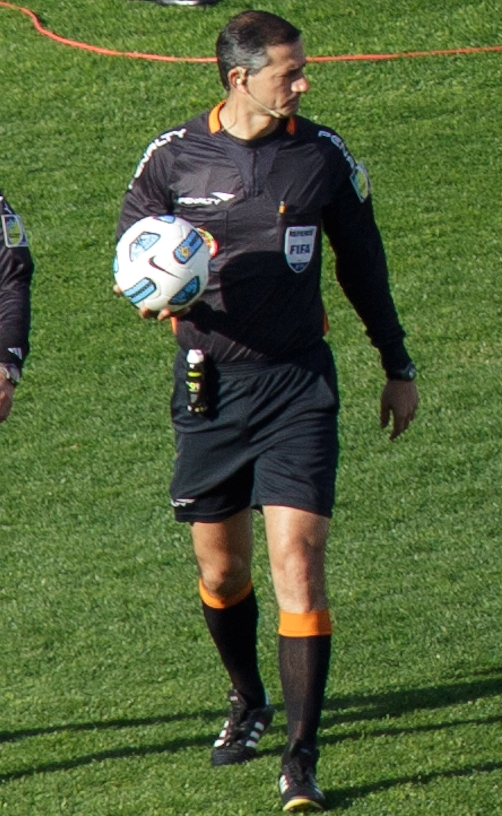 Sálvio Spínola Fagundes Filho é um ex-árbitro de futebol brasileiro. Foto de 2011, na ocasião foi o árbitro da final da Copa América de Futebol.